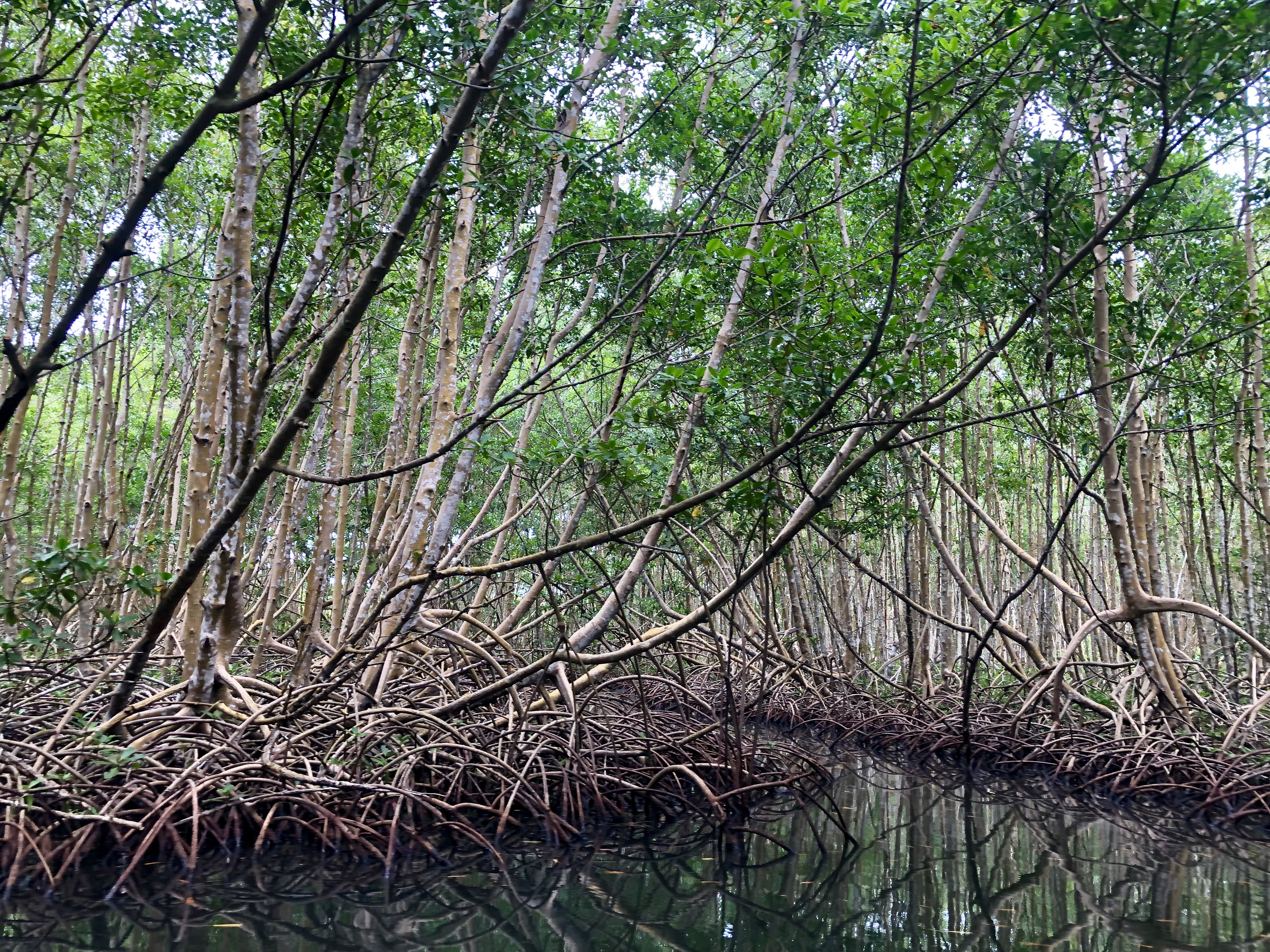 Mangrove de Sainte-Rose en Guadeloupe